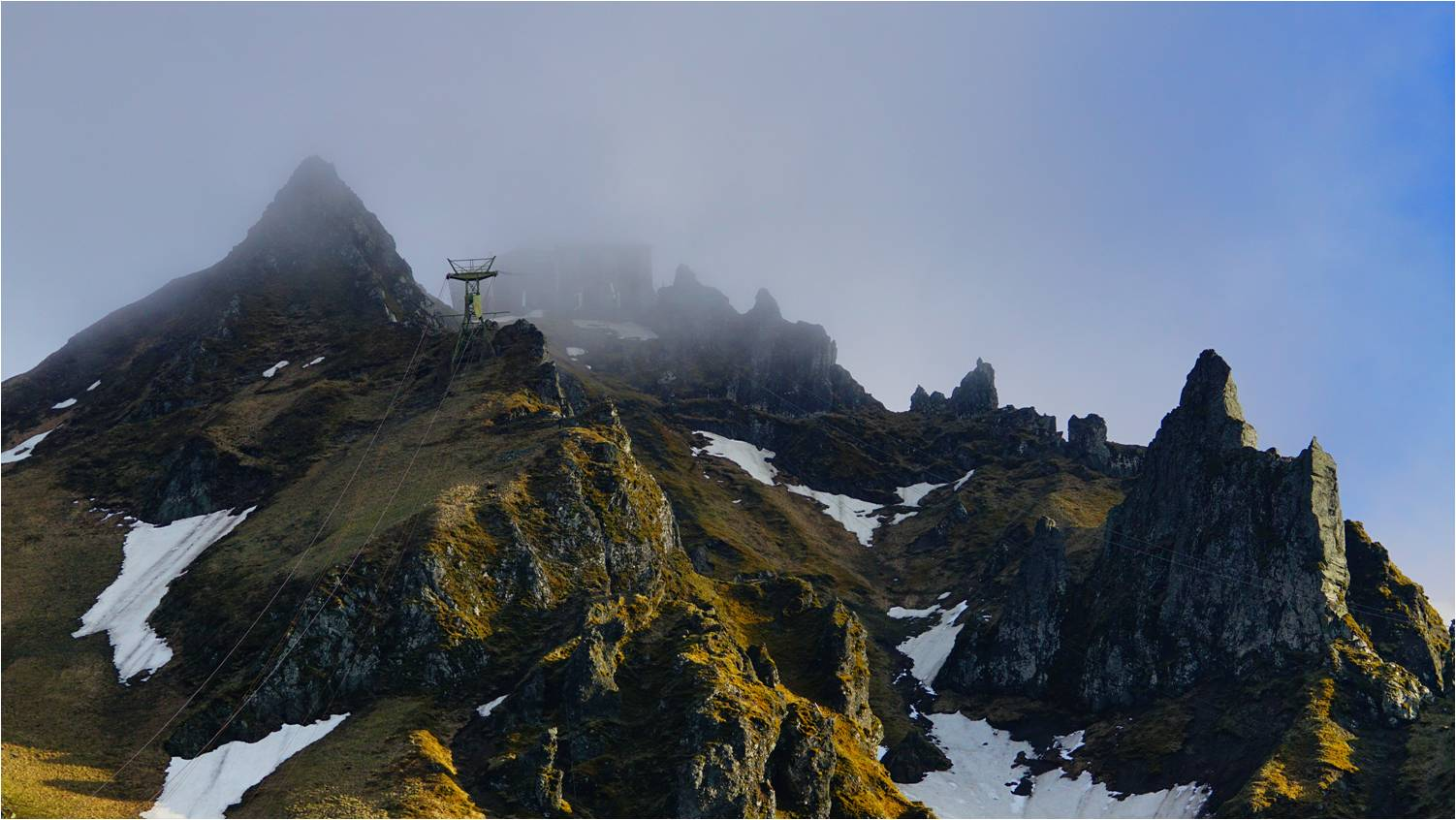 Zoom rapproché sur la gare téléphérique et une particularité du Massif du Sancy